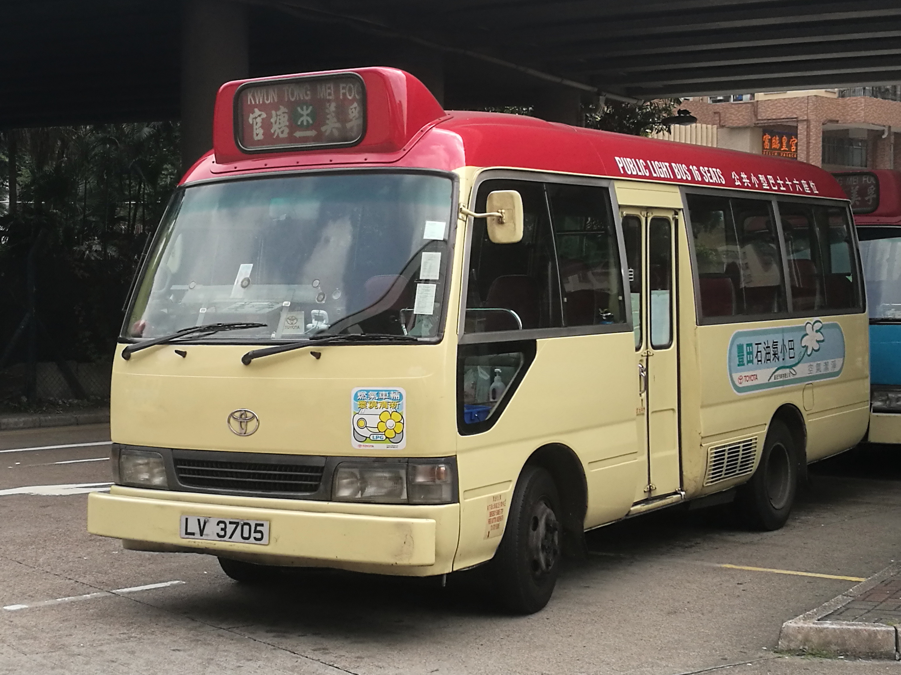 小巴LV3705的照片